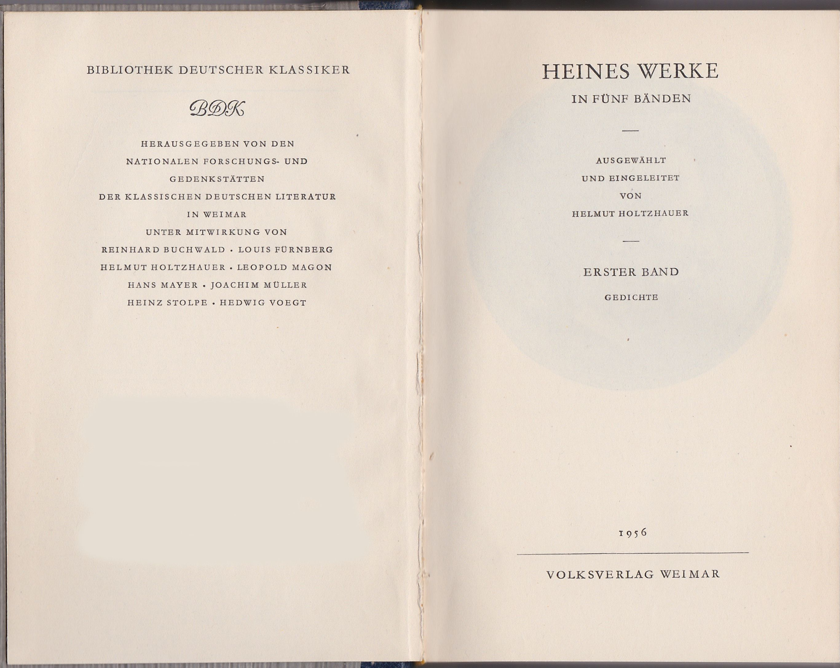 Heines Werke in fünf Bänden. Frontispiz und Titelblatt der 1. Auflage, Volksverlag Weimar 1956 (17. Auflage 1988)